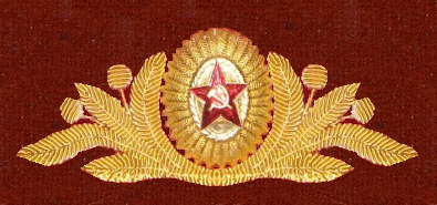 Шитье ген мвд 1969